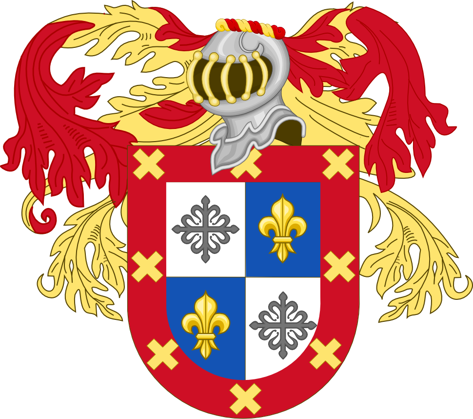 También se lo puede encontrar como Íñigo o Ýñigo.